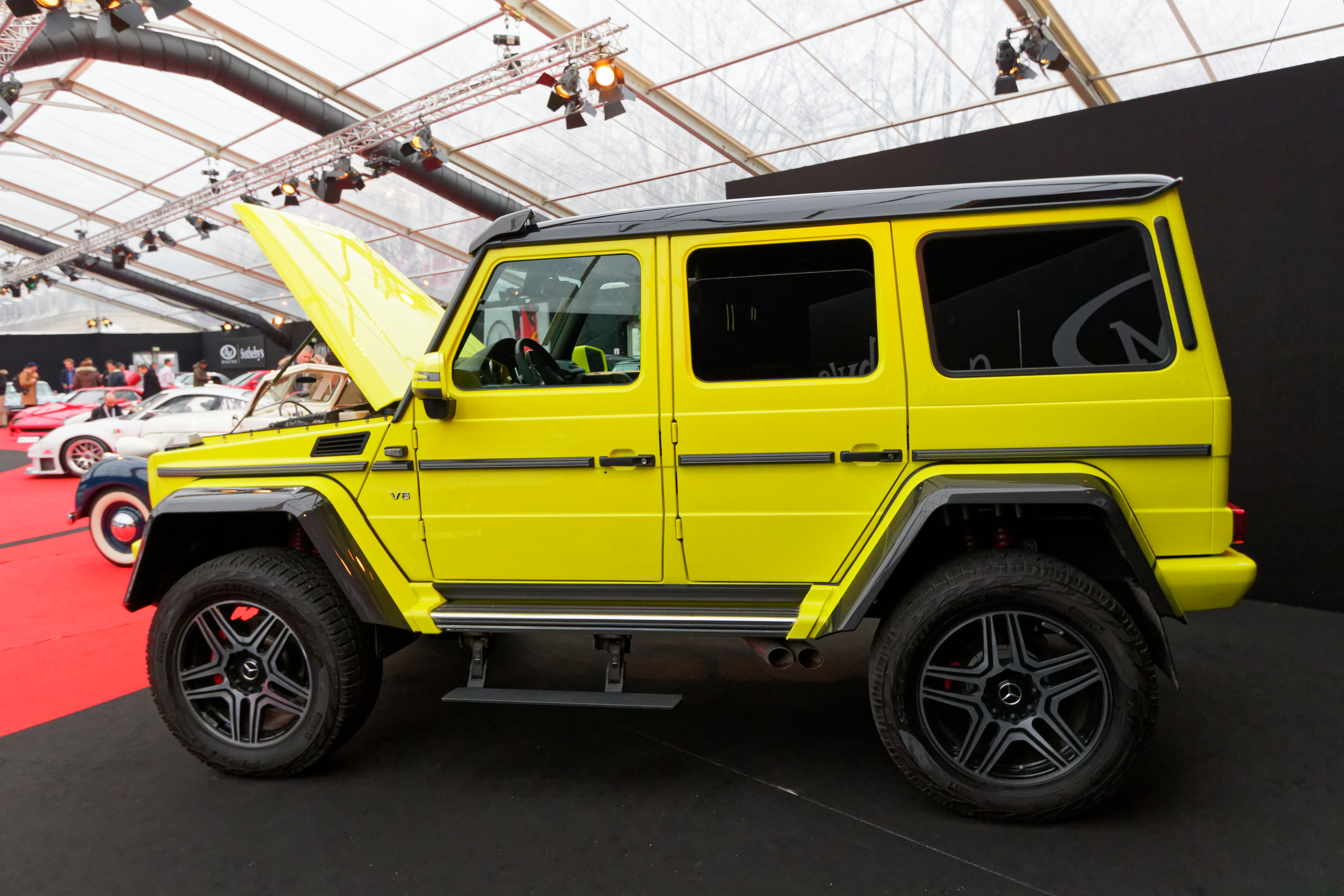 Un véhicule exposé lors de la vente RM Sotheby’s 2018 aux Invalides à Paris.